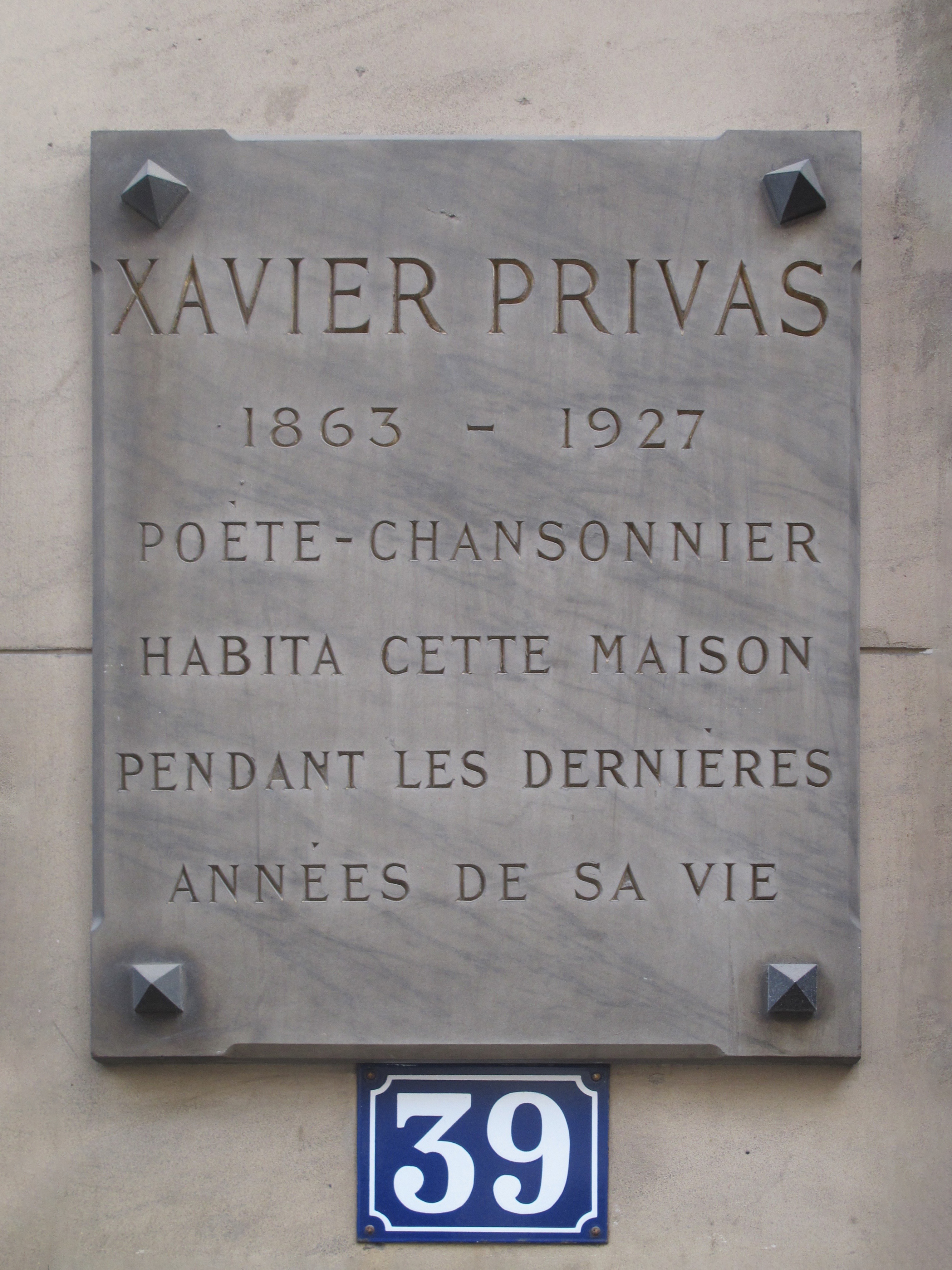 Plaque en hommage à Xavier Privas, 39 rue Jean-de-La-Fontaine (Paris, 16e).